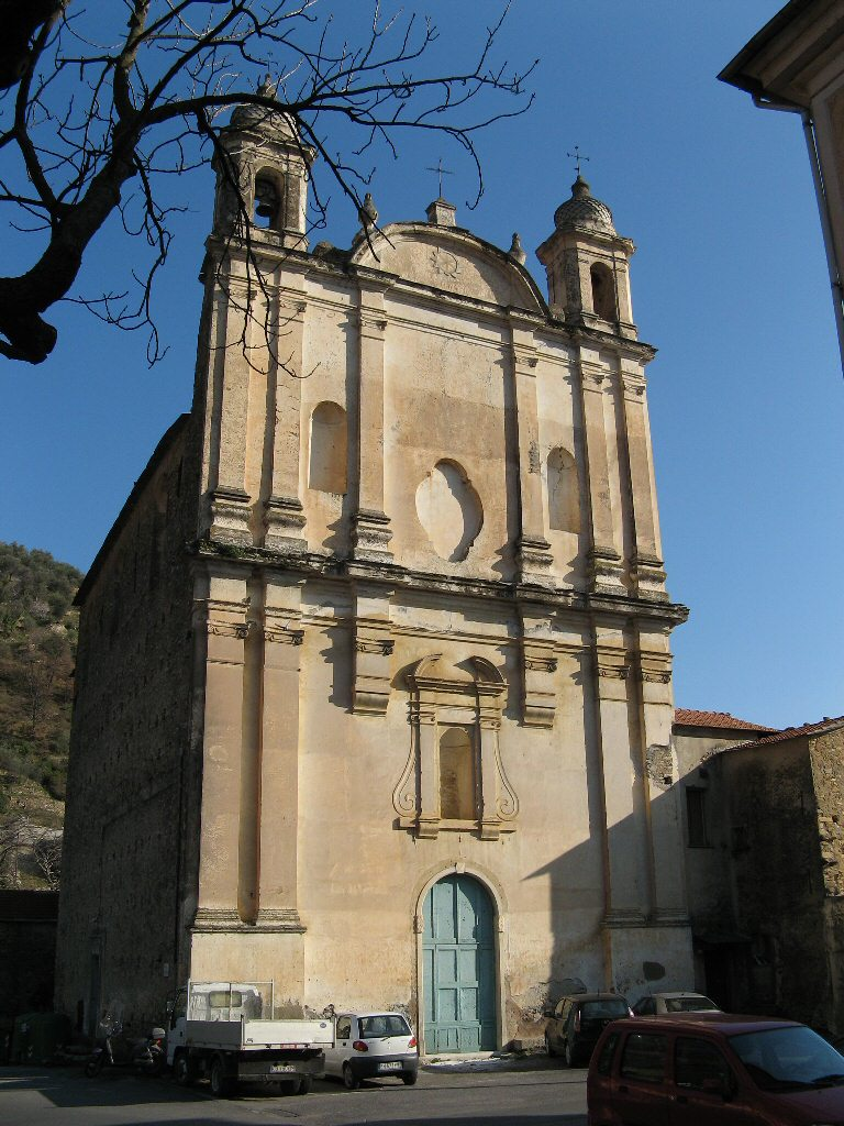 Oratorio di S.Lorenzo, Dolcendo, Imperia, Italy